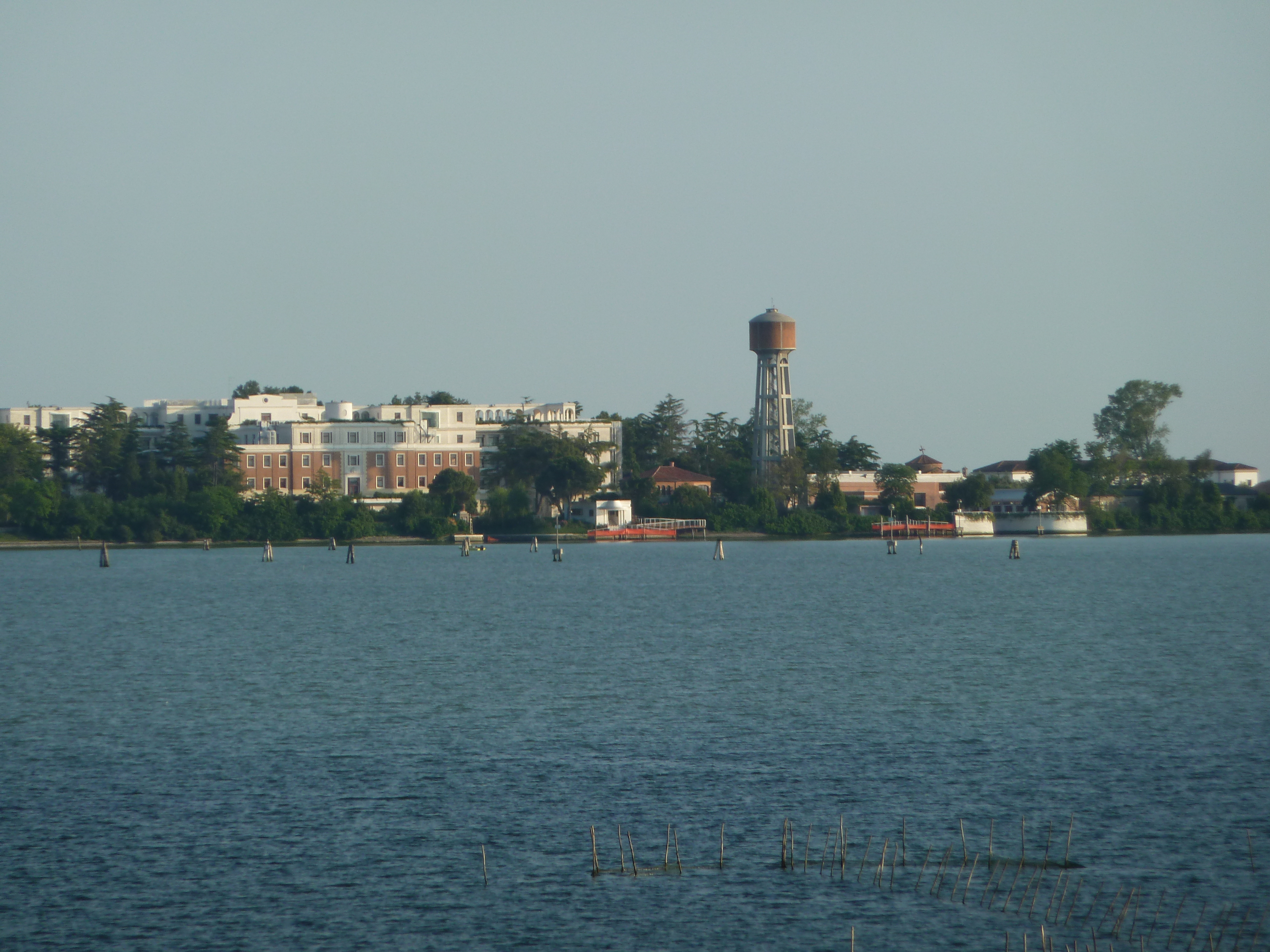 Sacca Sessola (Venice)